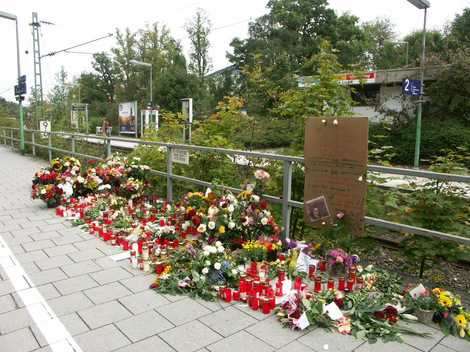 Der Tatort am Bahnsteig in München-Solln am 19. September 2009. Selbst sechs Tage nach der Tat legen Menschen Blumen ab, zünden Kerzen an und hinterlassen Briefe. Auch am gegenüberlegenden Bahnsteig befindet sich eine Gedenkstelle ähnlichen Umfangs.